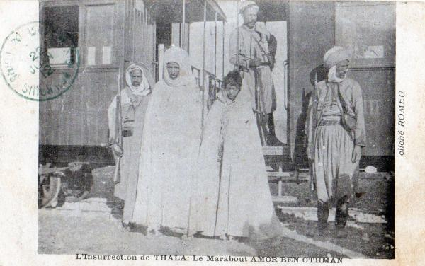 Marabout Amor Ben Othman instigateur de l'Affaire de Thala-Kasserine en 1906, lors de son arrestation